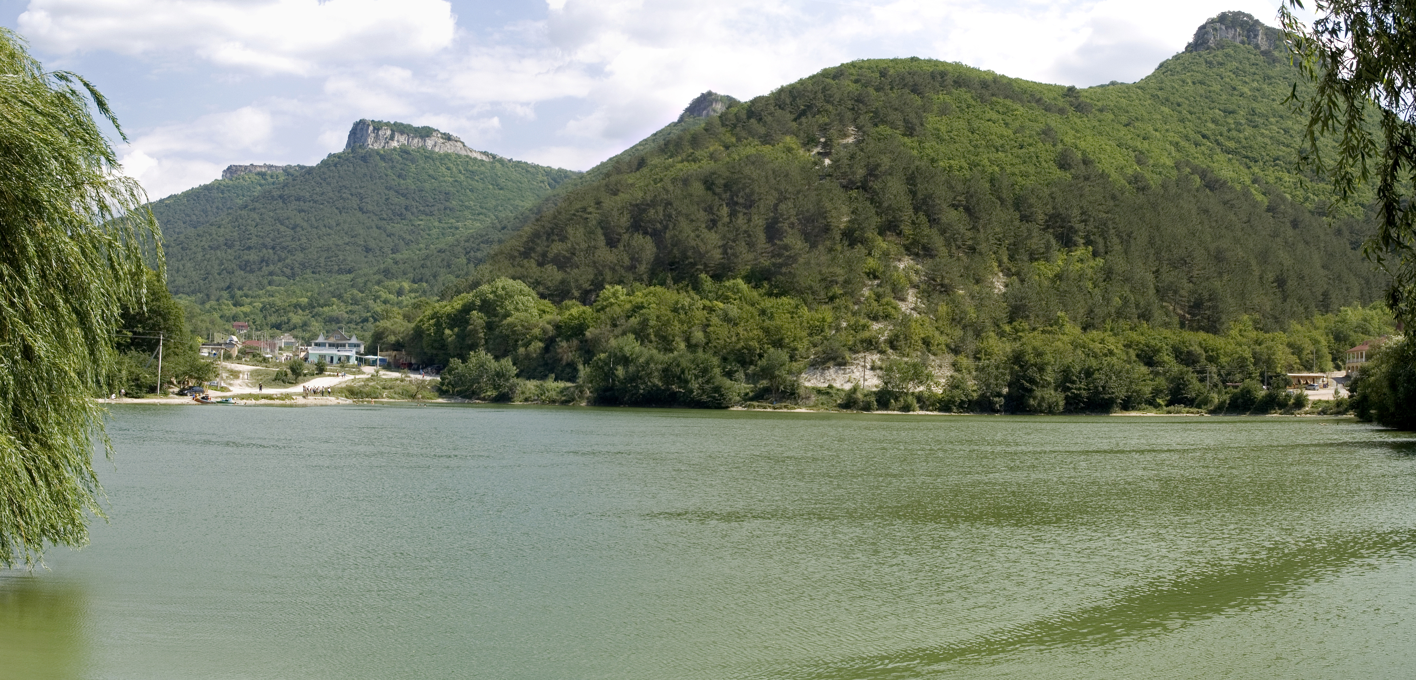 Украина, Крым, Бахчисарайский район. Гора Баба-Даг (пещерный город Мангуп-Кале)